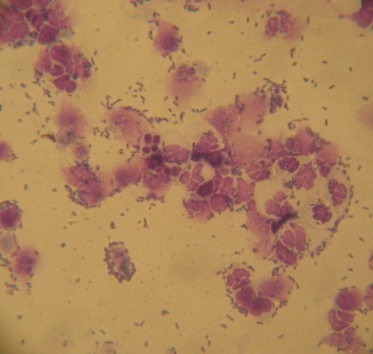 Mikroskopisches Harnsediment einer Katze mit Pyelonephritis. Bei den Zellen handelt es sich um degenerierte neutrophile Granulozyten. Beachte die starke bakterielle Besiedlung.